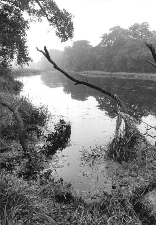 Naturschutzgebiet Steckby-Lödderitzer Forst ADN-ZB Link 24.10.1981 Bezirk Magdeburg: Auenwald-Naturschutzgebiet - Das bedeutendste Auenwald-Naturschutzgebiet Mitteleuropas, der Steckby-Lödderitzer Forst, wurde von der UNESCO im November 1979 als Biosphären-Reservat anerkannt. Es ist eines von über 150 Reservaten des internationalen Umweltüberwachungssystems, das dem Studium der Wechselbeziehungen zwischen Mensch und Umwelt dient. Die naturnahme Aue (X), eine Niederungslandschaft im Übergangsbereich vom atlantischen zum kontinentalen Klima mit einer reichhaltigen Pflanzen- und Tierwelt, ist charakteristisch für dieses Reservat. Das Biosphären-Reservat "Naturschutzgebiet Steckby-Lödderitzer Forst" wird von Mitarbeitern des Instituts für Landschaftsforschung und Naturschutz der Akademie der Landwirtschaftswissenschaften in Zusammenarbeit mit ehrenamtlichen Naturschutzhelfern betreut. Unser Bild entstand am Altwasser der Elebe im Lödderitzer Teil des Naturschutzgebietes. (X) Eiche, Esche, Ulme Feldahorn, Schwarzpappel, Wildapfel- und birne sind typsch für den Auernwald.